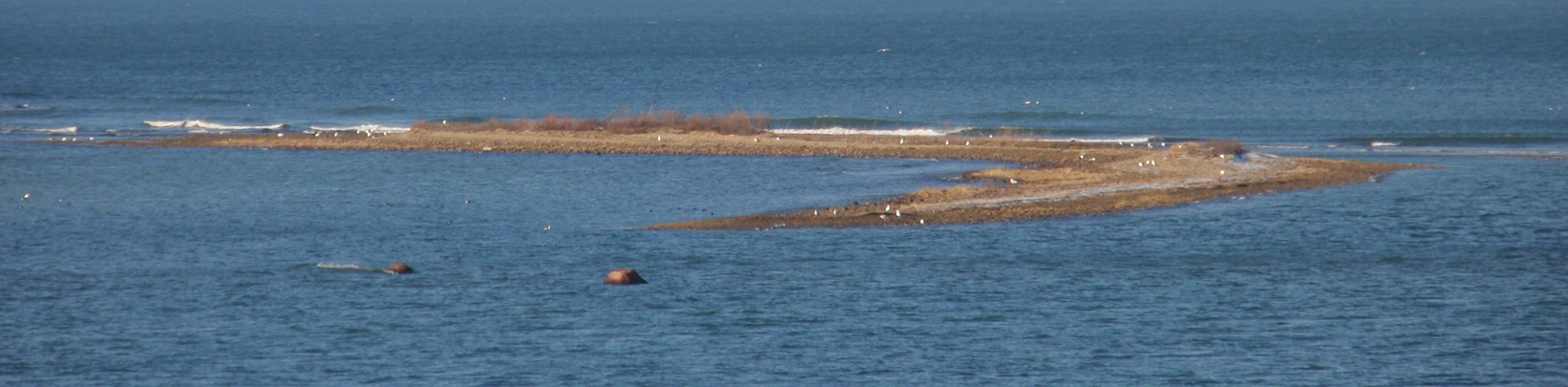 Liivakari